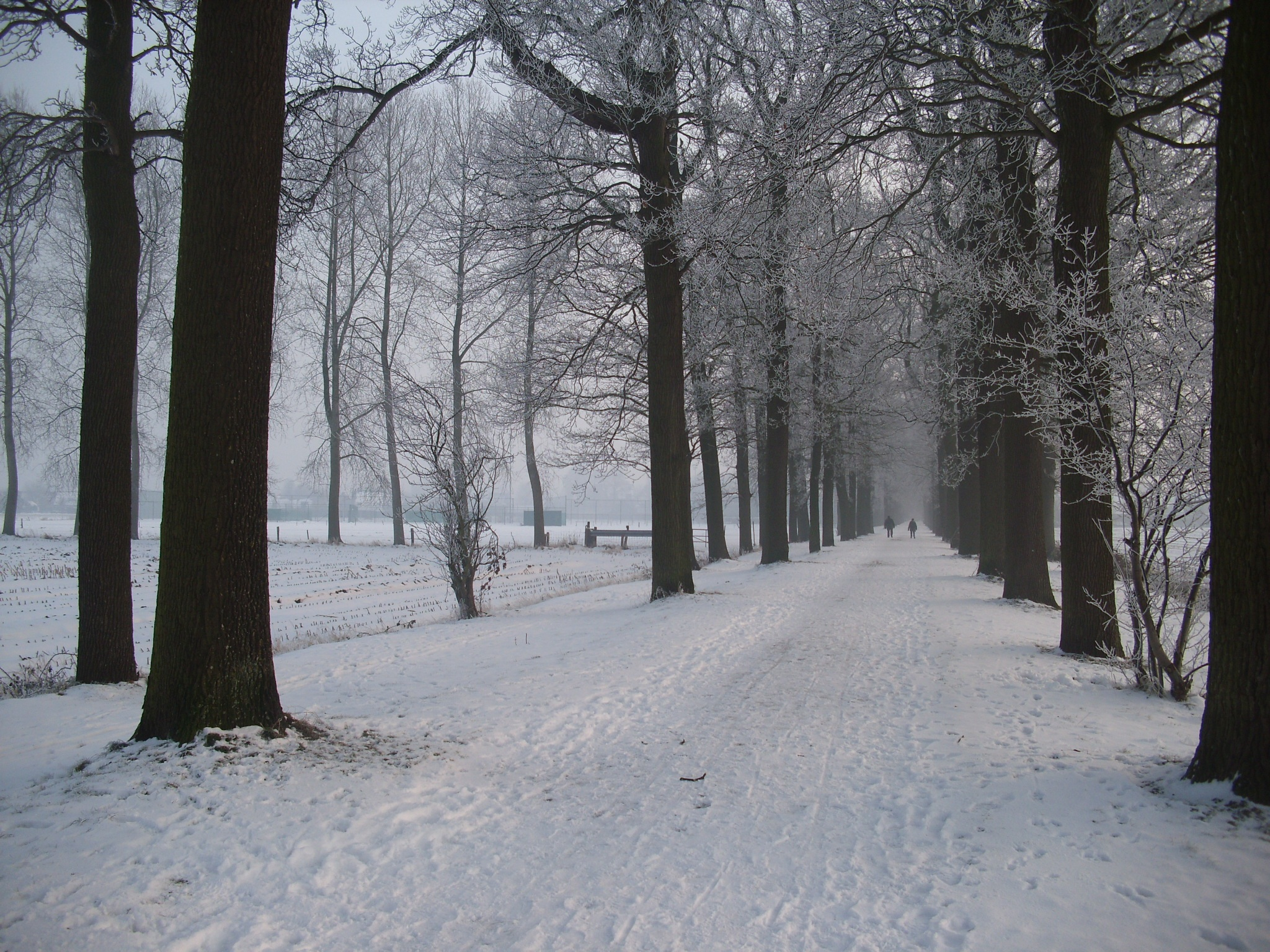 Hof van Straeten - gezien richting kerk tijdens de winter van 2012-2013 - Varsenare - Jabbeke - West-Vlaanderen - België